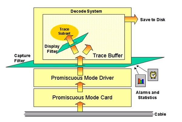 Монгол: Зураг 2